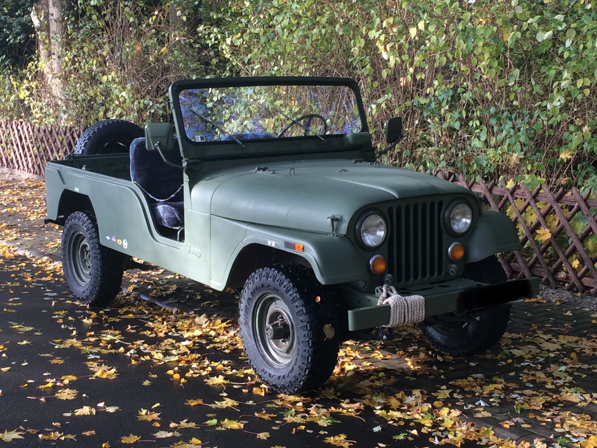 Jeep CJ 6 AMC 3,8